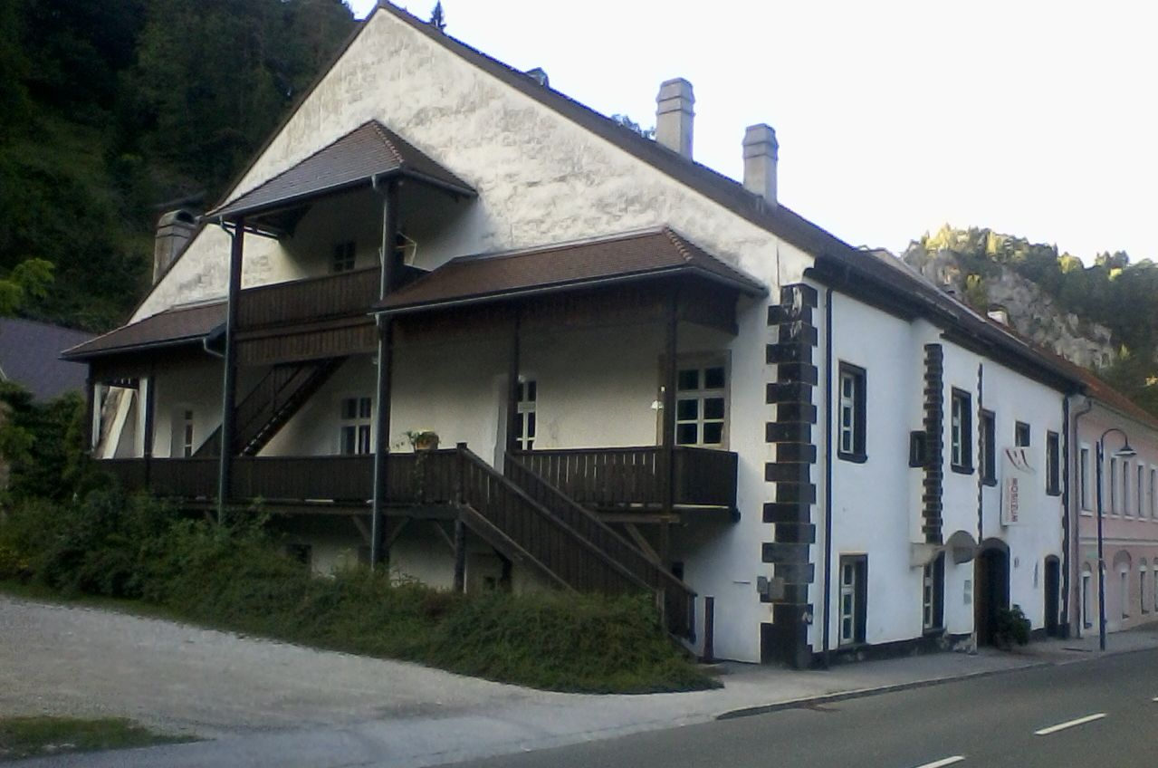 Schottwien/Österreich: Doktorhaus, heute beherbergt es das Verkehrsmuseum Mobileum, eine kleine Bierbrauerei und ein Einrichtungshaus.